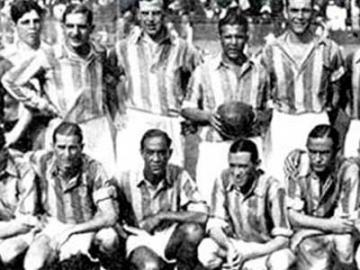 Equipo Campeón de la primera división de fútbol de Argentina en 1933.